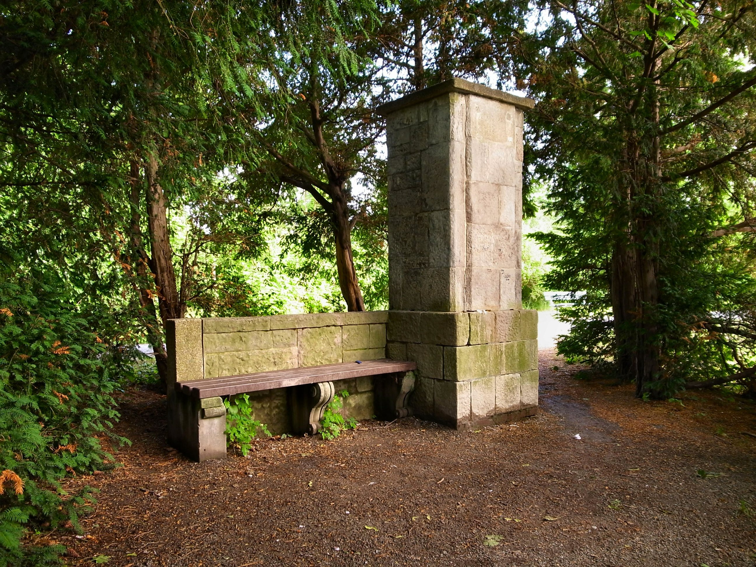 Rümelin Gedenkstein im Dessauer Schillerpark. Errichtet 1909 zum 70.Geburtstag mit einer (nicht mehr vorhandenen) Reliefplatte.